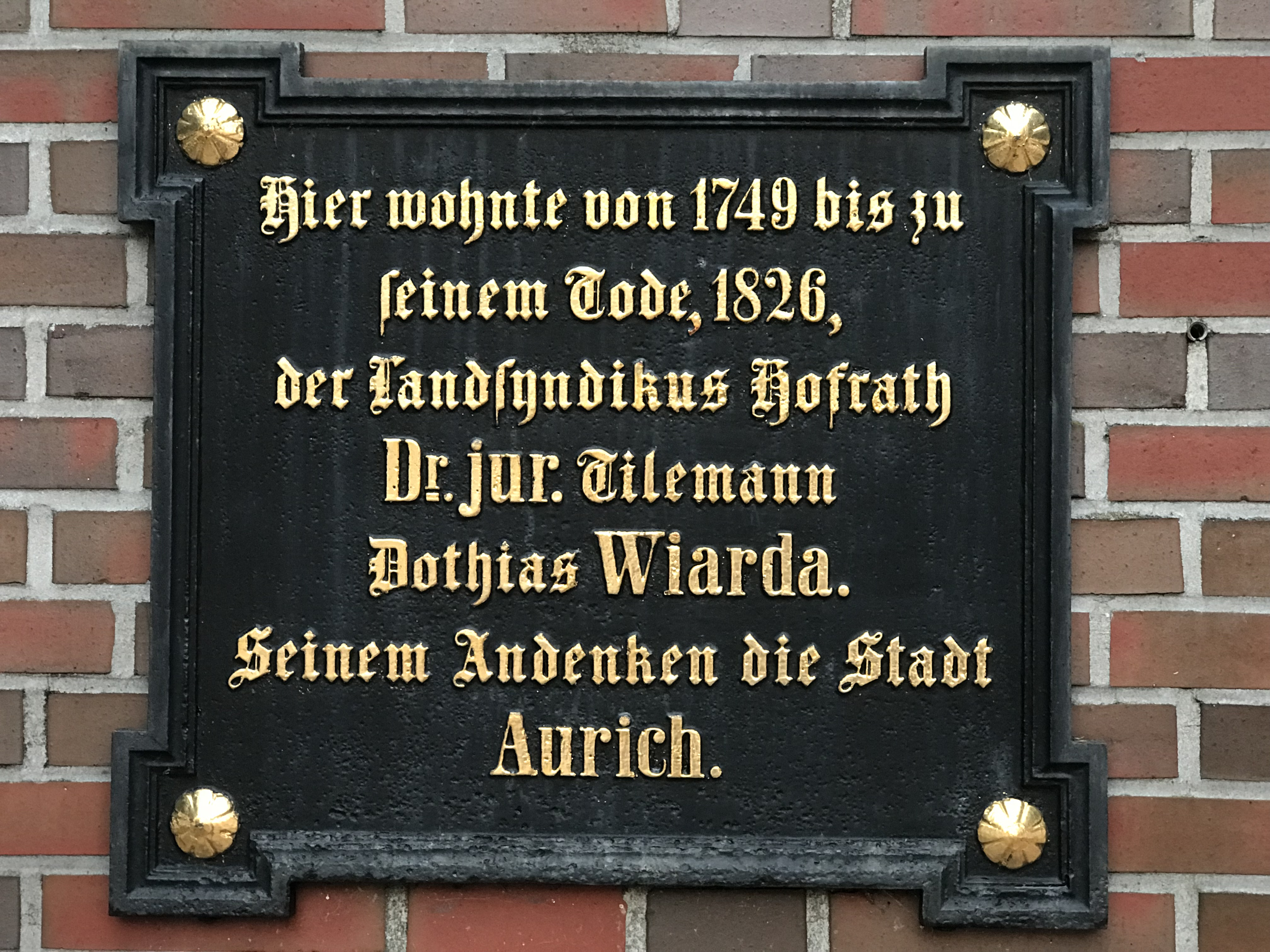 Gendenktafel für Dr. Tilemann Dothias Wiarda